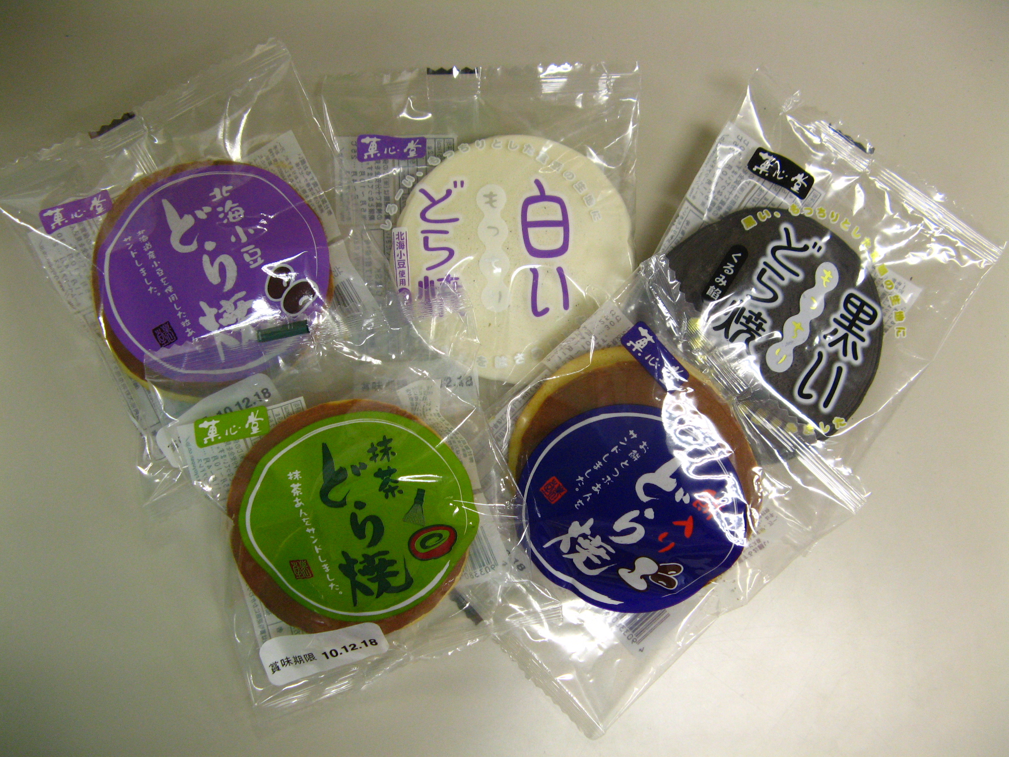 いろいろ種類があるもんだ